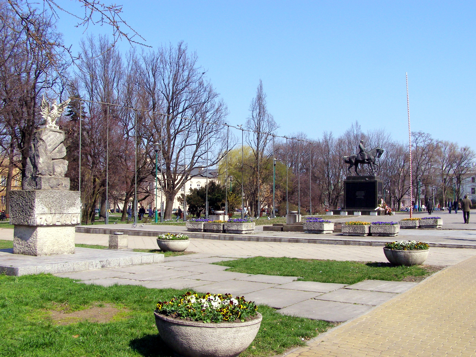 Plac Litewski w Lublinie